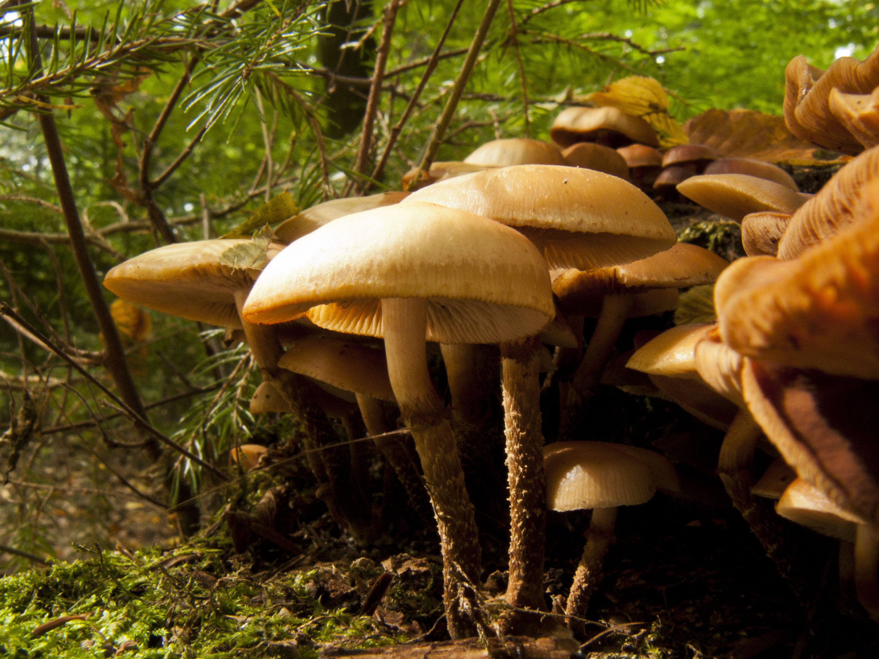 Opěnka měnlivá - Kuehneromyces mutabilis (Pholiota mutabilis). Les Moklina u Louňovic.